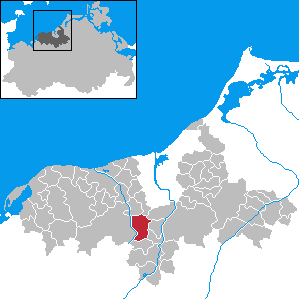 Ziesendorf in Mecklenburg-Western Pomerania - District Bad Doberan